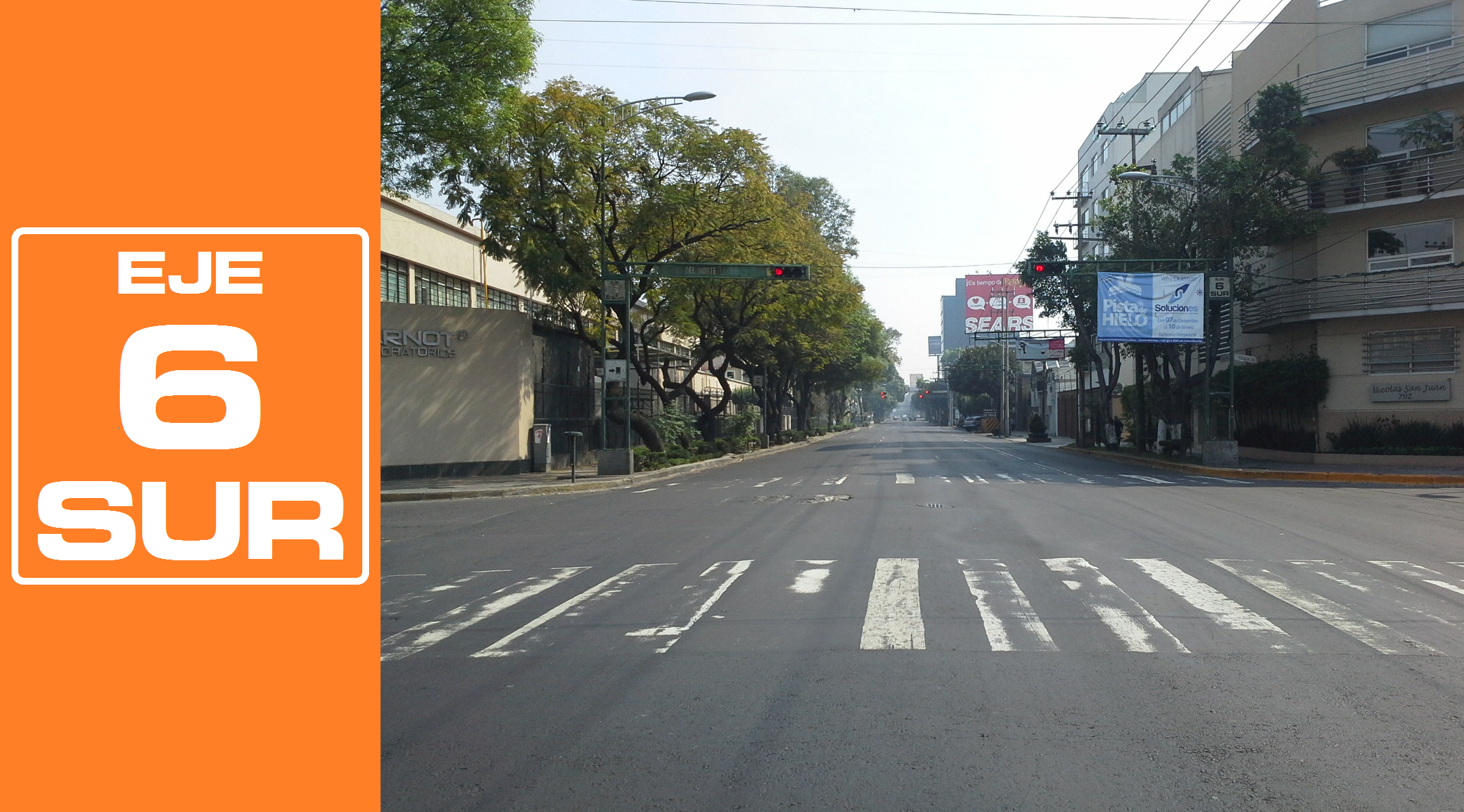 Rediseñado original de la señalética de los Ejes viales de la Ciudad de México por José García (Wiki ID: narumiyama)